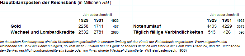 Vergleich der Hauptbilanzposten der Reichsbank von 1929, 1931 (und 1933).